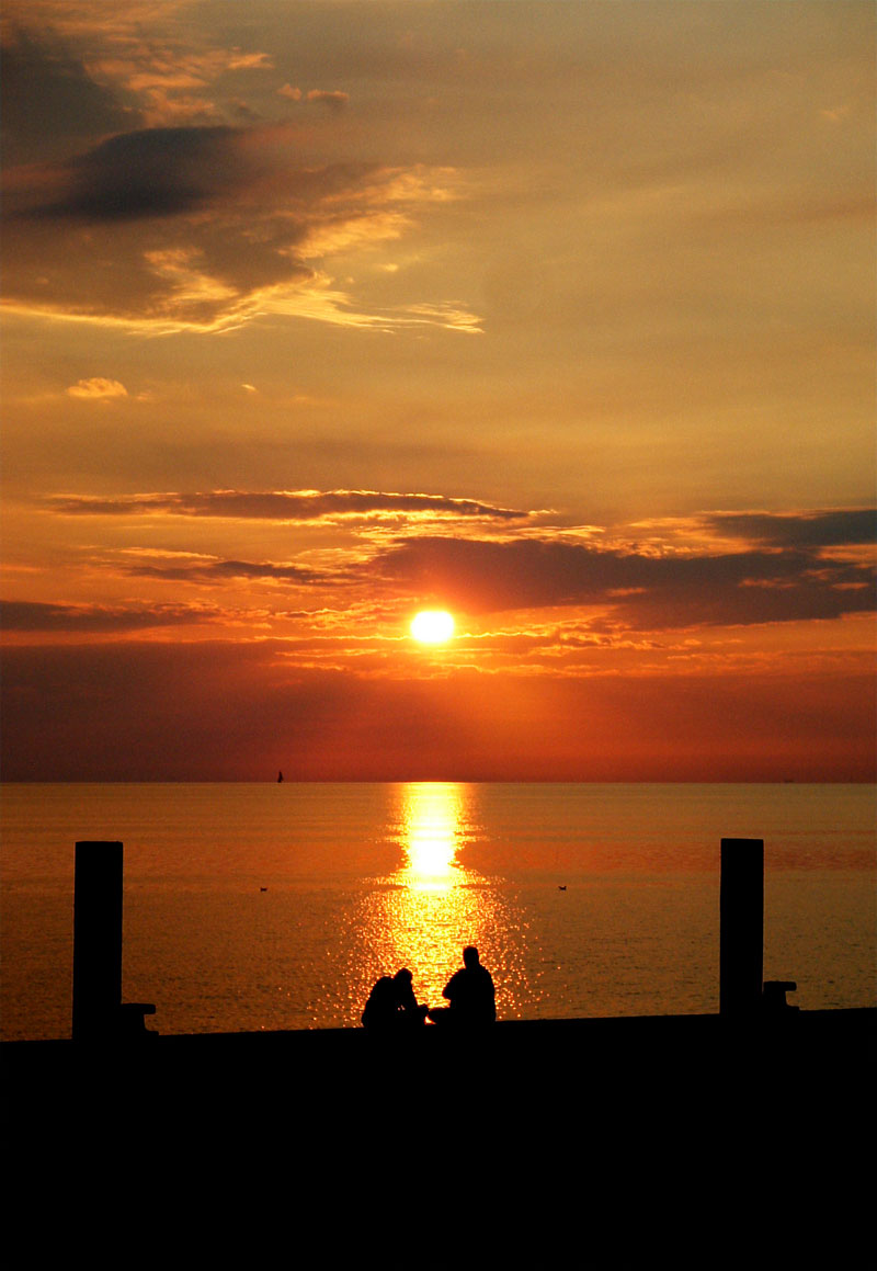 Autor: Ralf Roletschek Marcela GNU-FDL (selbst aufgenommen)